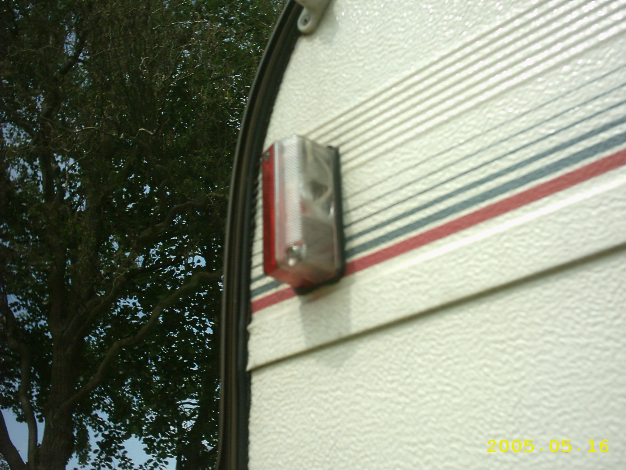 Erdfunkstelle bei Hammelburg (Detail) Fotograf: presse03, selbst fotografiert, 2005 Lizenz: GNU-FDL